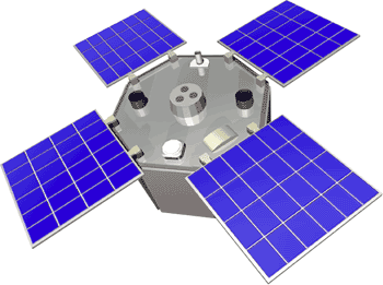 Eine Computersimulation des Forschungssatelliten ACRIMSat Andere Versionen: Datei:ACRIMPlan.png - beschriftet